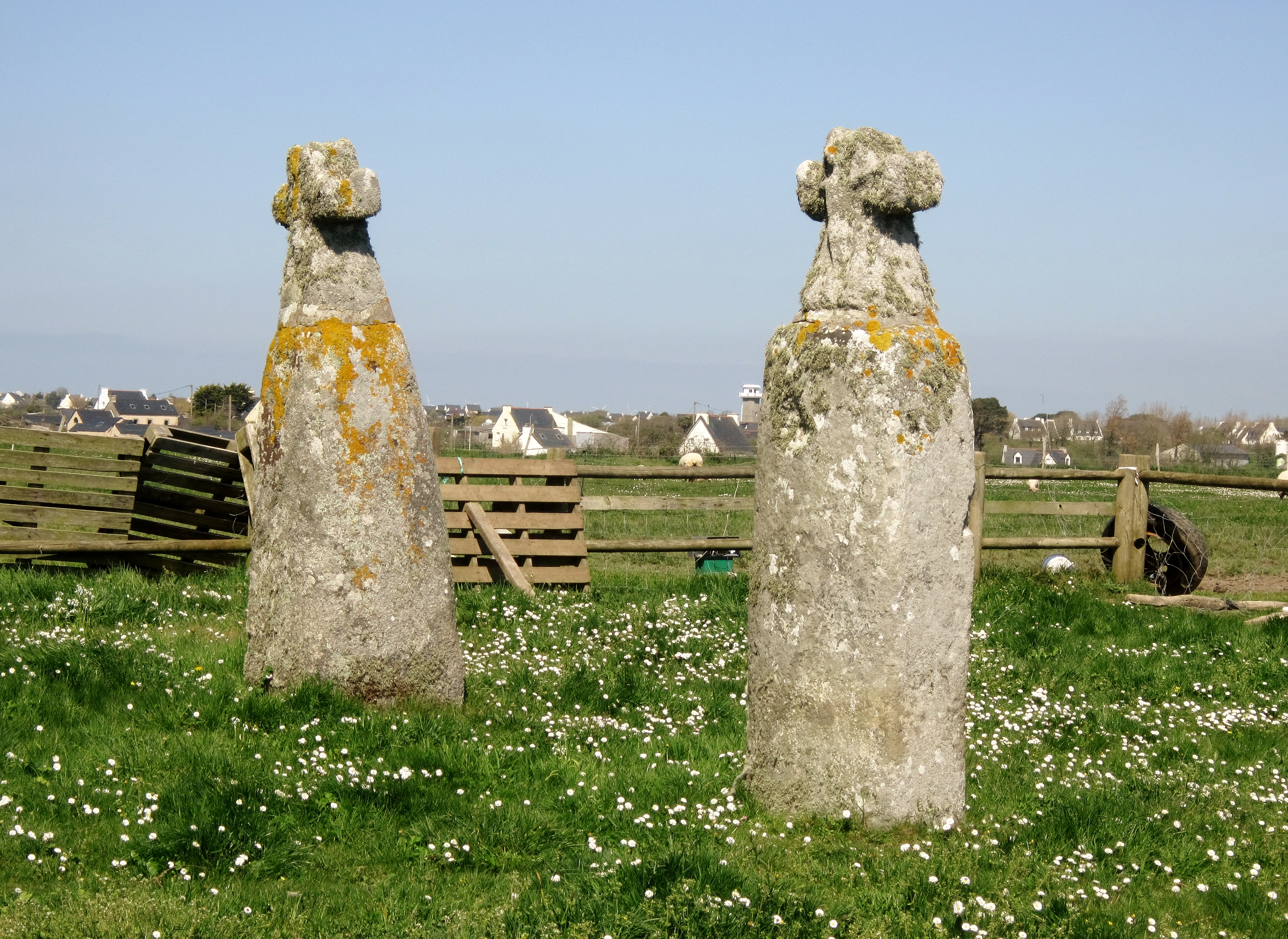 Le "Gibet des moines" : deux stèles probablement funéraires datant de l'âge du fer et par la suite christianisées, située le long de la voie antique menant à Saint-Mathieu ; selon un récit controversé, les moines de l'abbaye de Saint-Mathieu y auraient exercé leur droit de haute justice, mais c'était probablement à un autre endroit nommé Creac'h ar Justis.